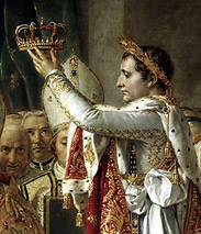 Ausschnitt: Napoléons Kaiserkrönung 1804 in Paris; Original im Musée National du Louvre, Paris. Öl, Leinwand, 610 X 931 cm